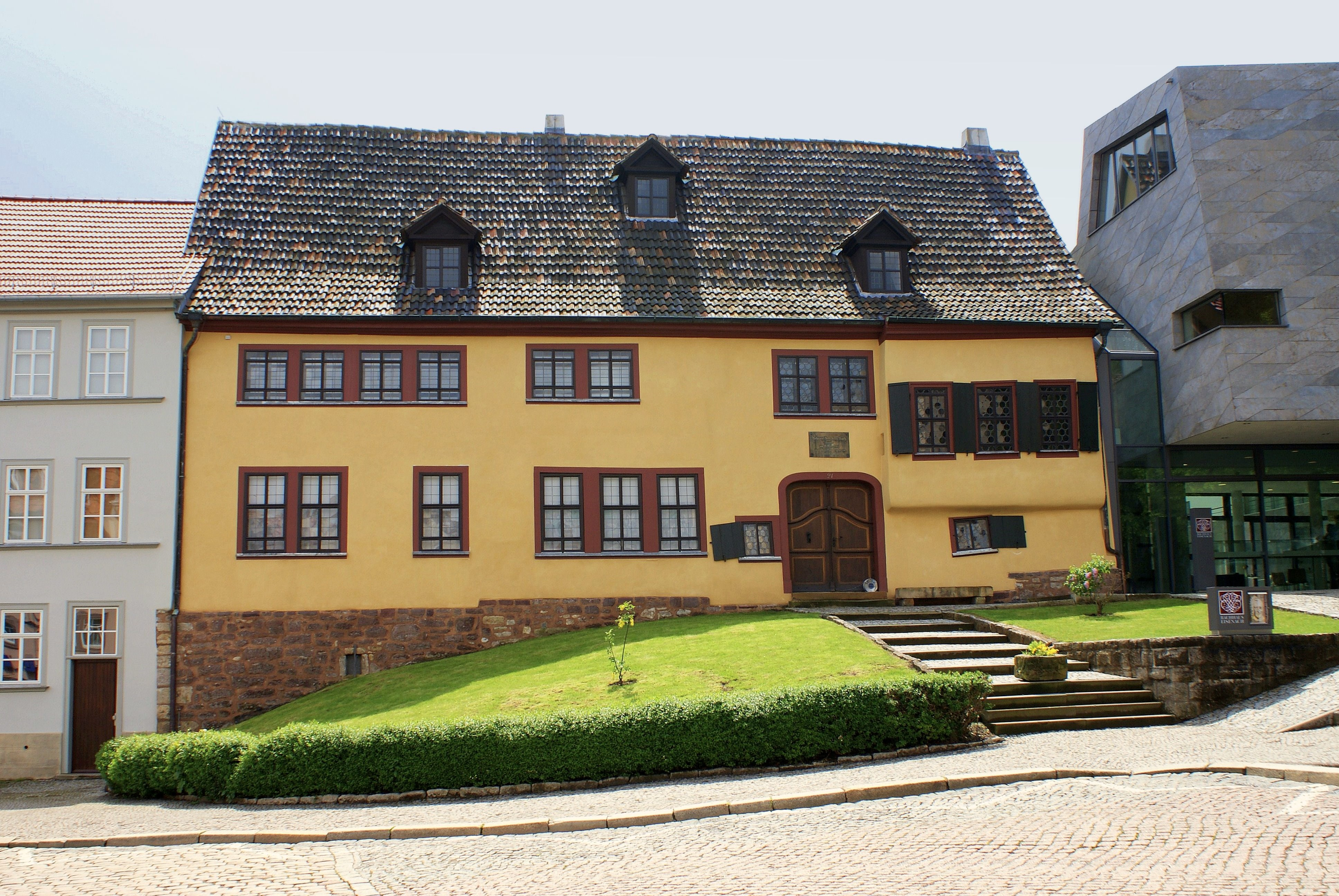 Das Bachhaus in Eisenach. Aufgenommen 2008.